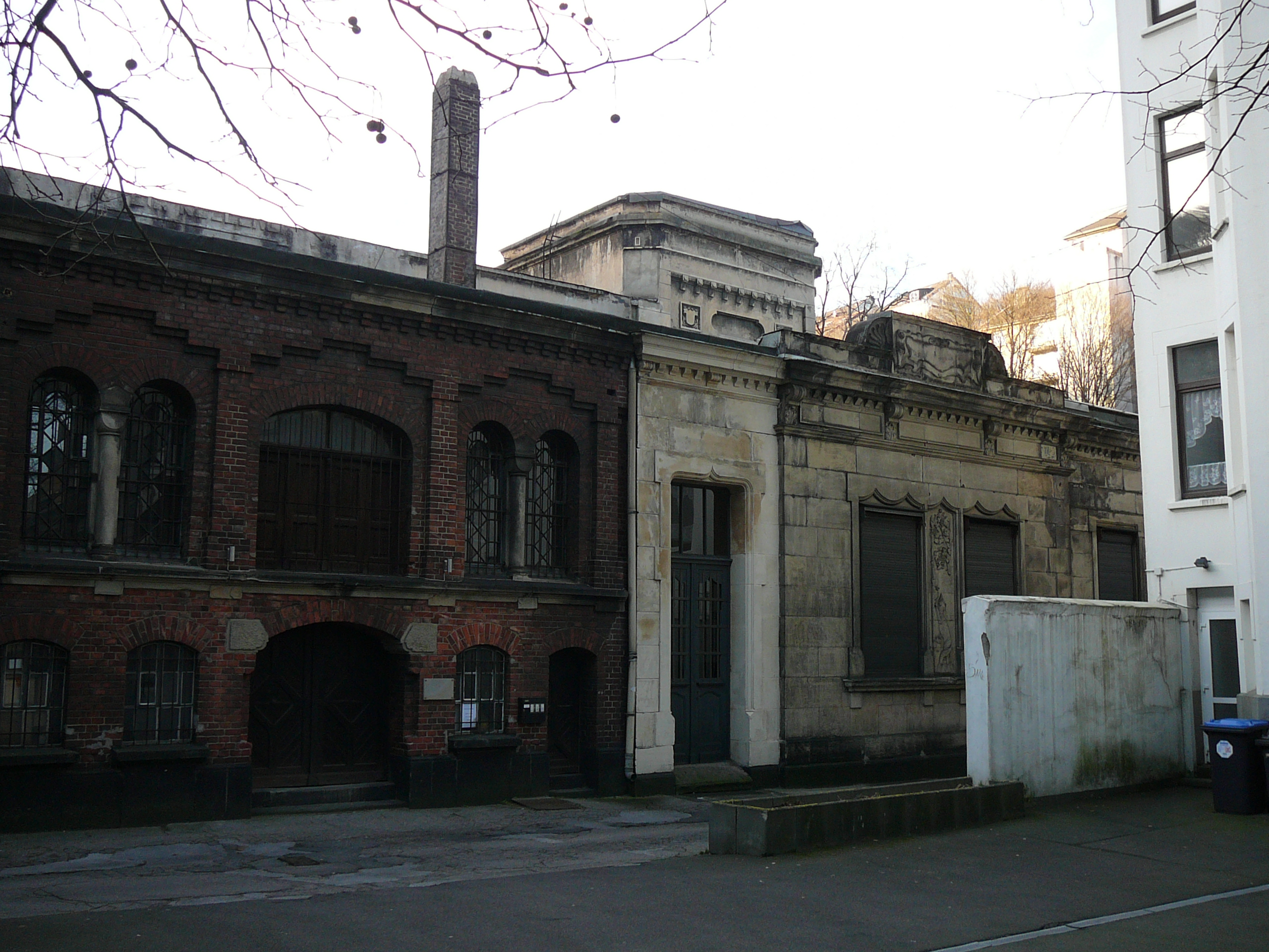 Friedrich-Ebert-Str., Wuppertal